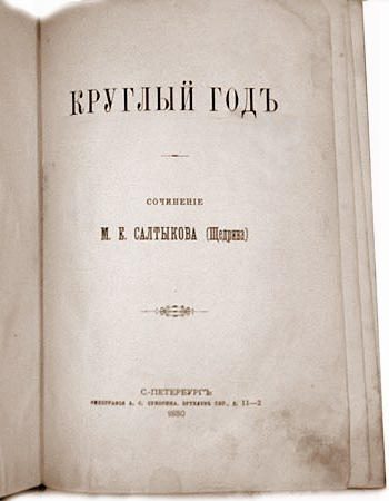 Салтыков-Щедрин, Первое издание сборника Круглый год, 1880 год (титул с частью разворота) «Круглый год». Сочинение М. Е. Салтыкова-Щедрина. — СПб., тип. А. С. Суворина, 1880 г. Выпущено в свет между 16 и 23 июня 1880 г.